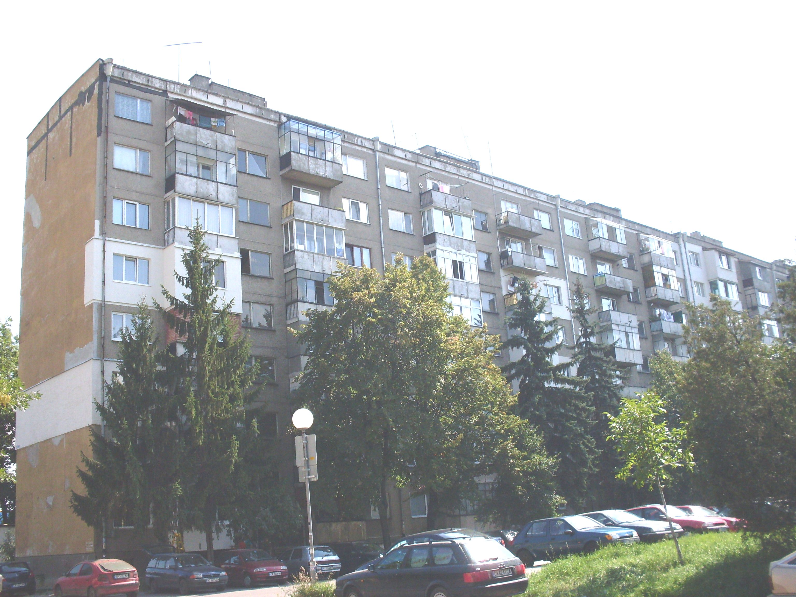 Жилищна сграда по номенклатура Бс-VІІІ-Сф - предна фасада (север/запад)